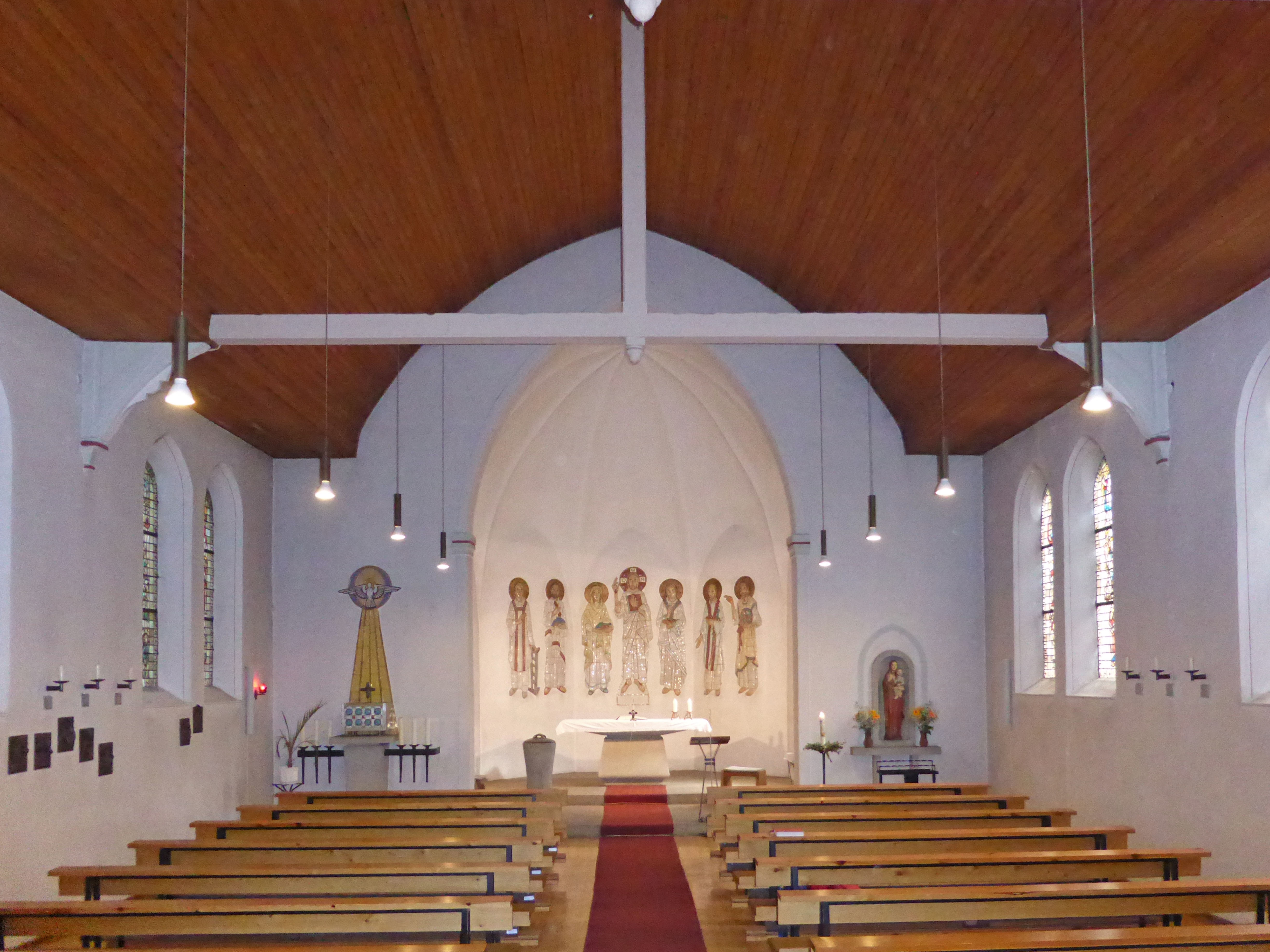 Katholische Kirche in Loburg.